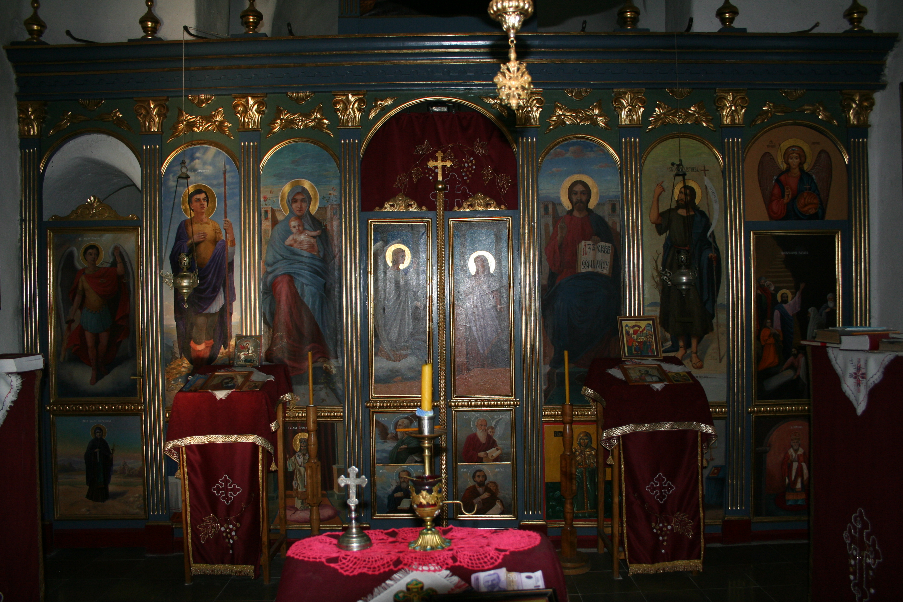 Crkva Sv. Dimitrija, Markova crkva